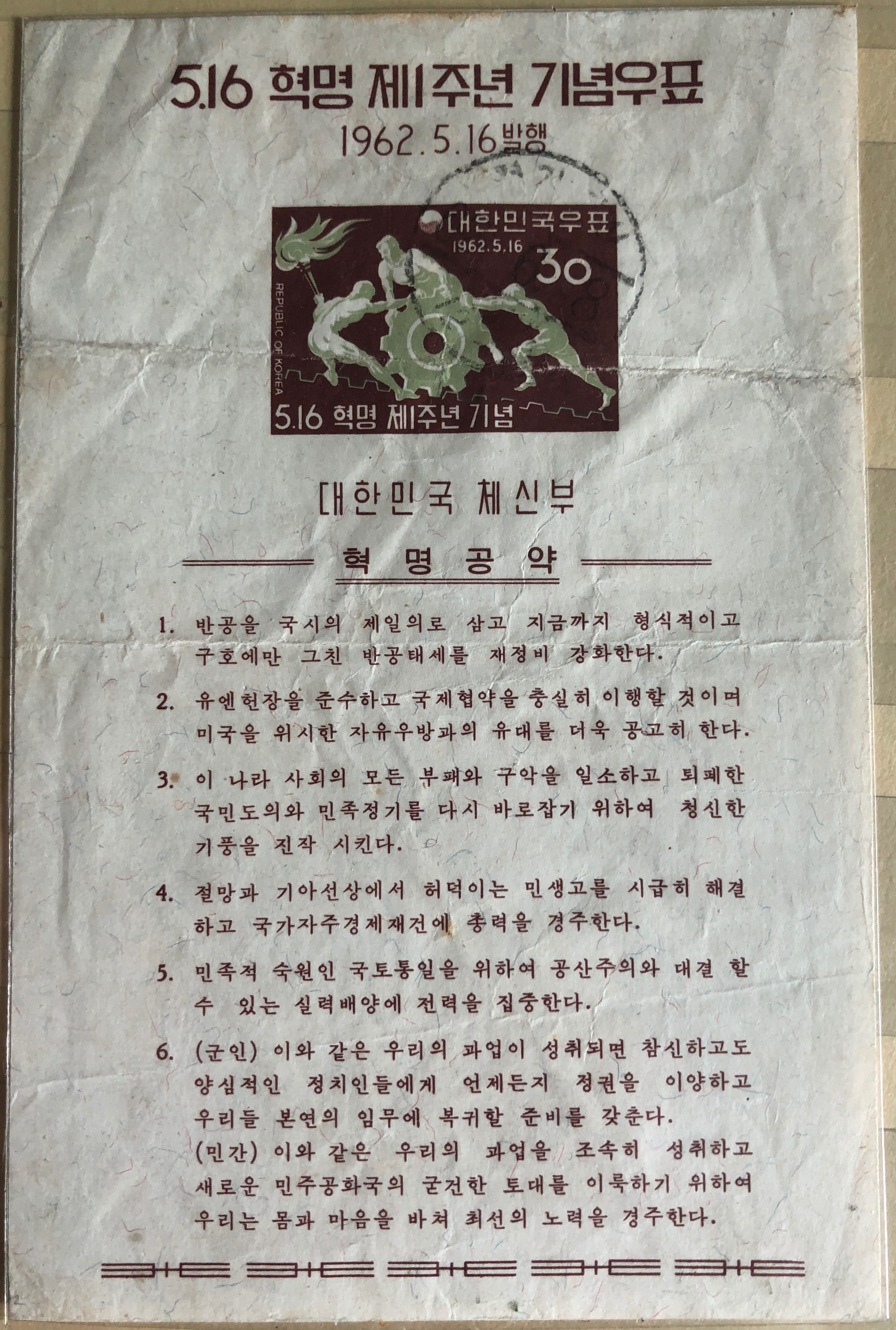 516 혁명 제 1주년 기념우표 2